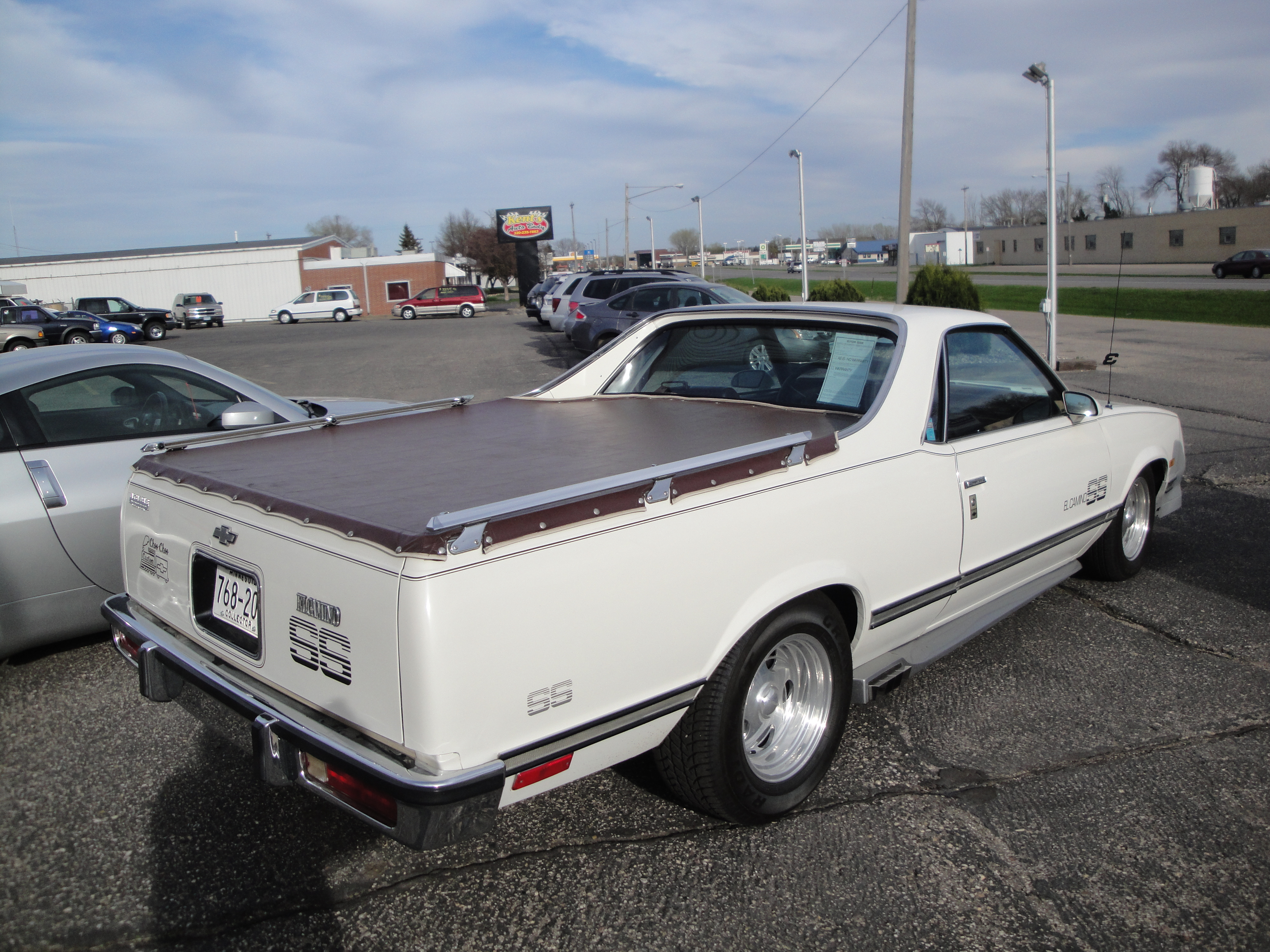 86 Chevrolet El Camino SS